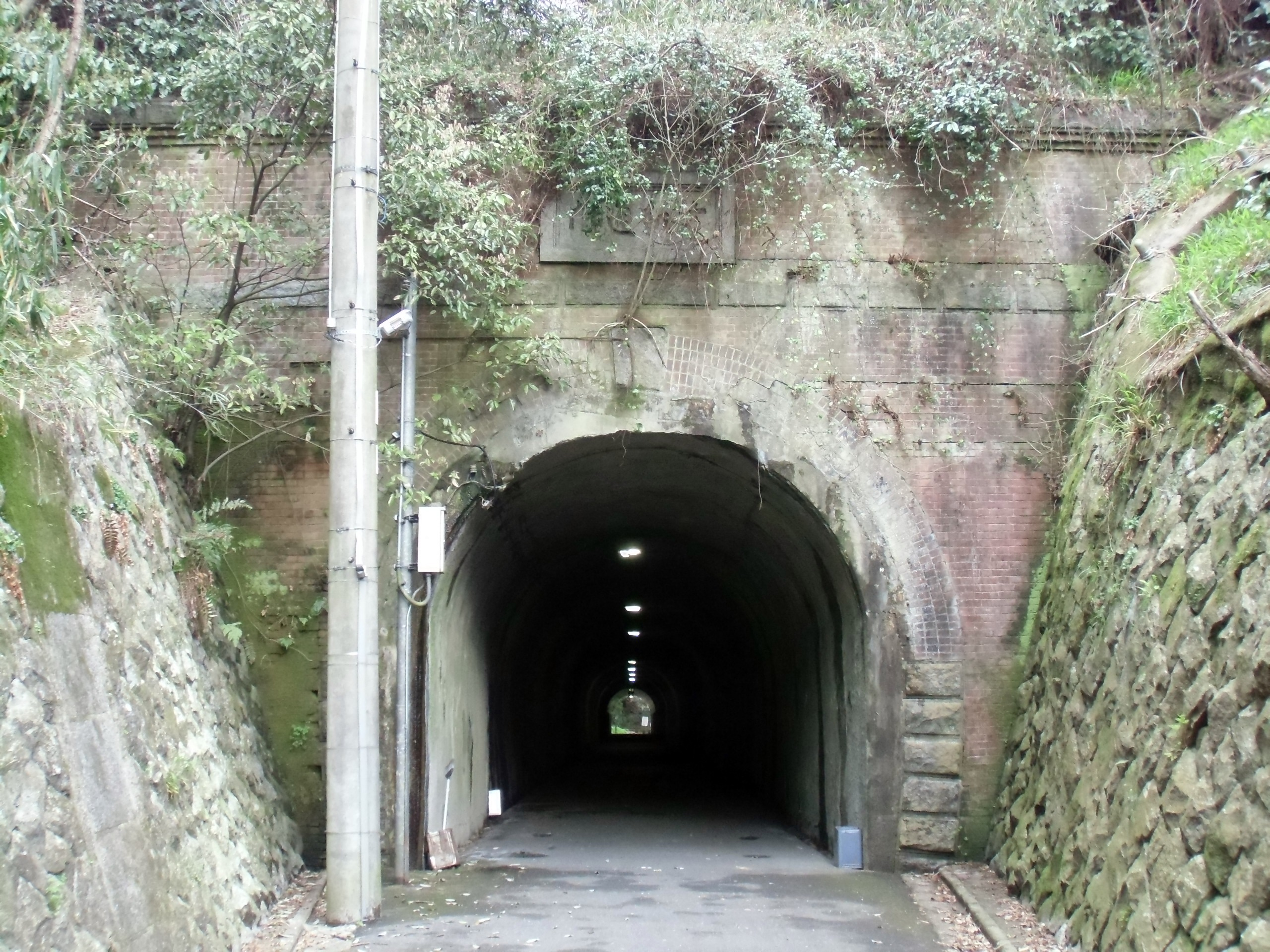 花山トンネル（東山側から望む）